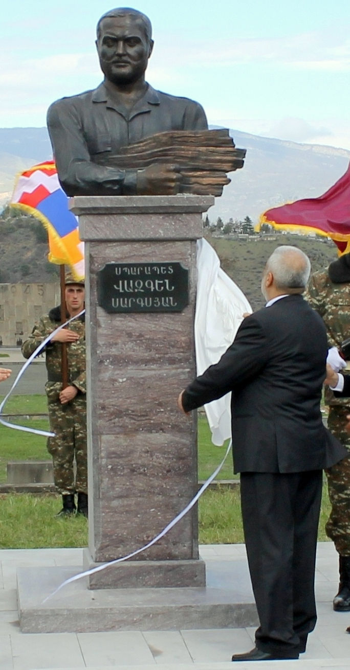 Վազգեն Սարգսյանի կիսանդրու բացումը Կապանում